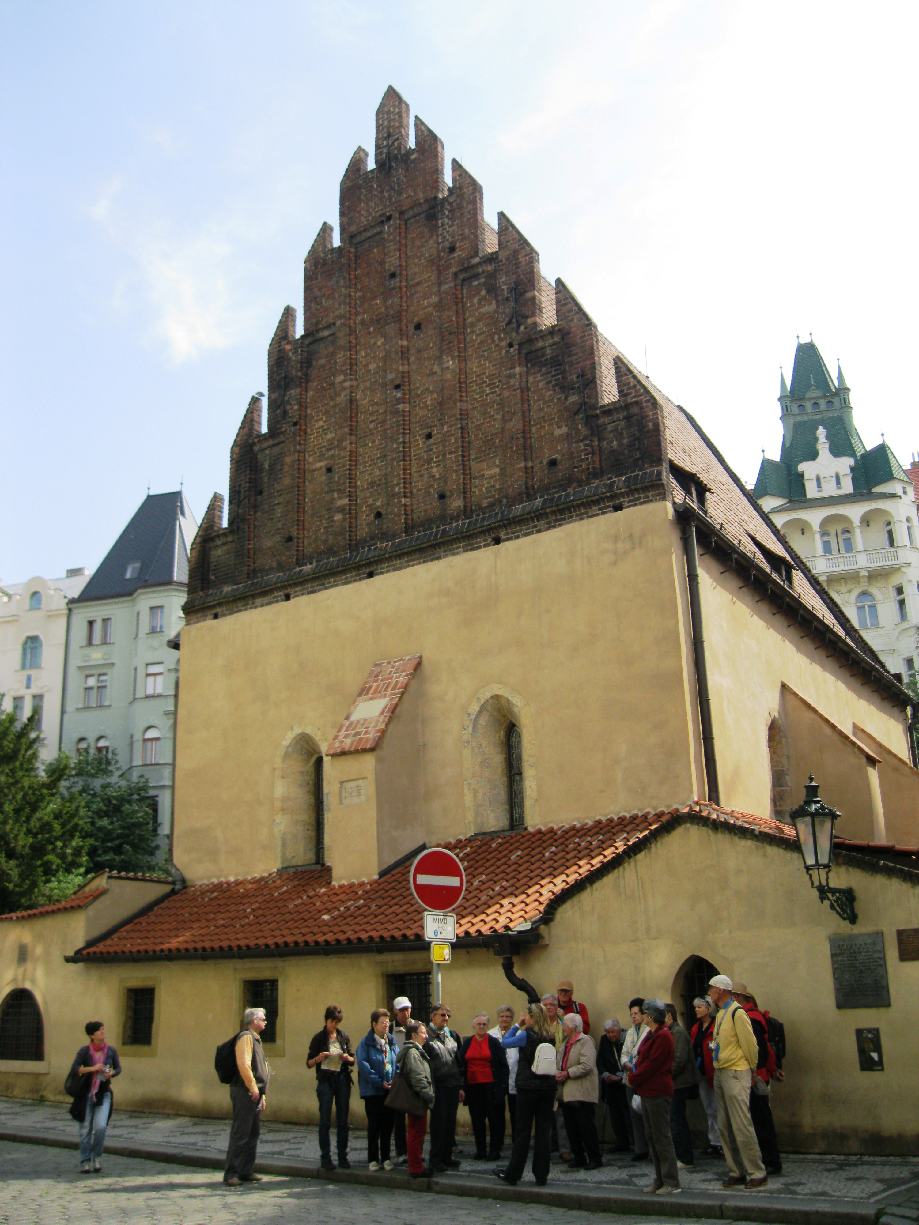 Staronová synagoga, Červená, Maiselova, Josefov, Praha 1